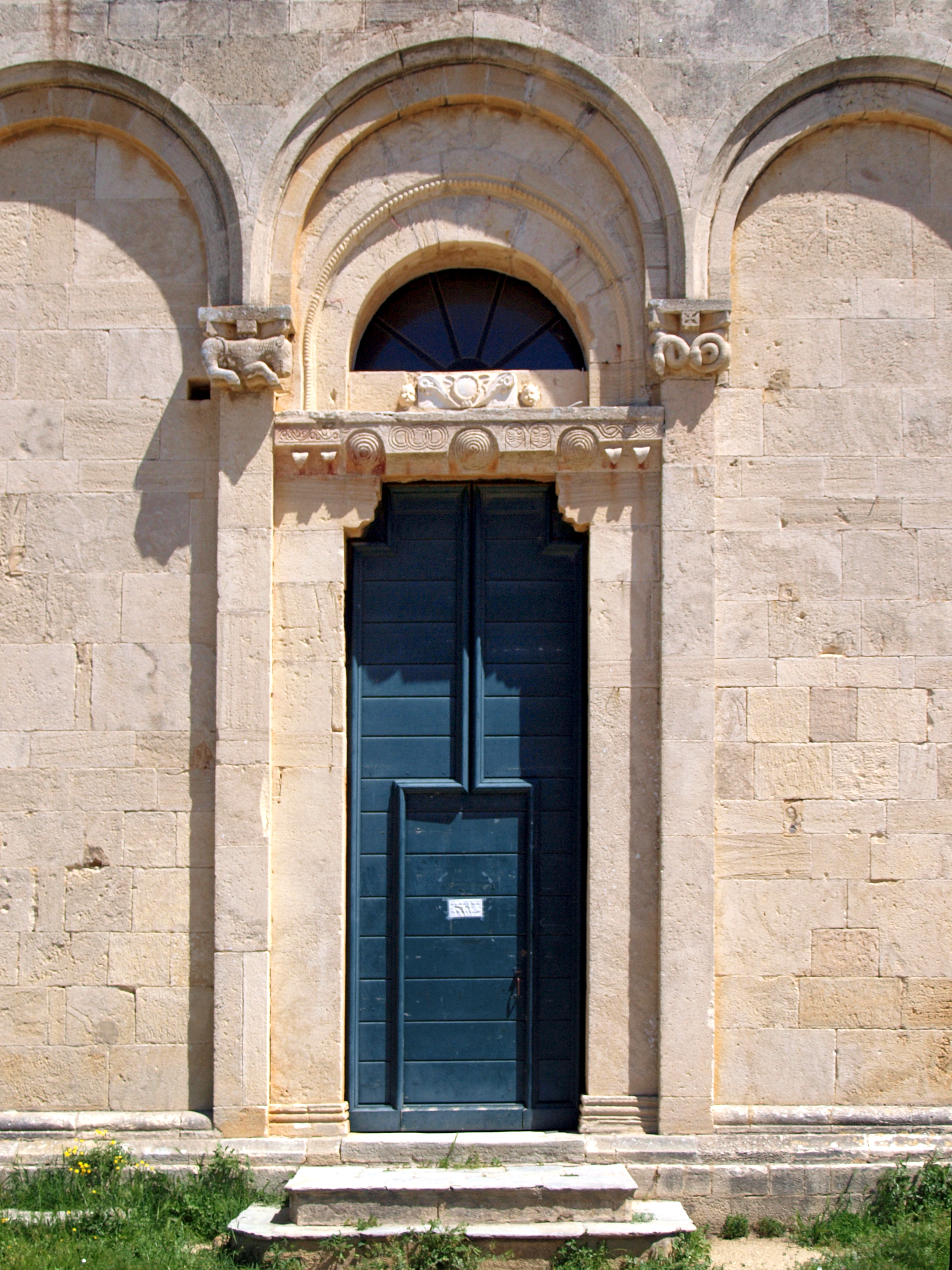 Saint-Florent, Nebbio (Corse) - Portail de la façade occidentale de l'ancienne cathédrale du Nebbiu